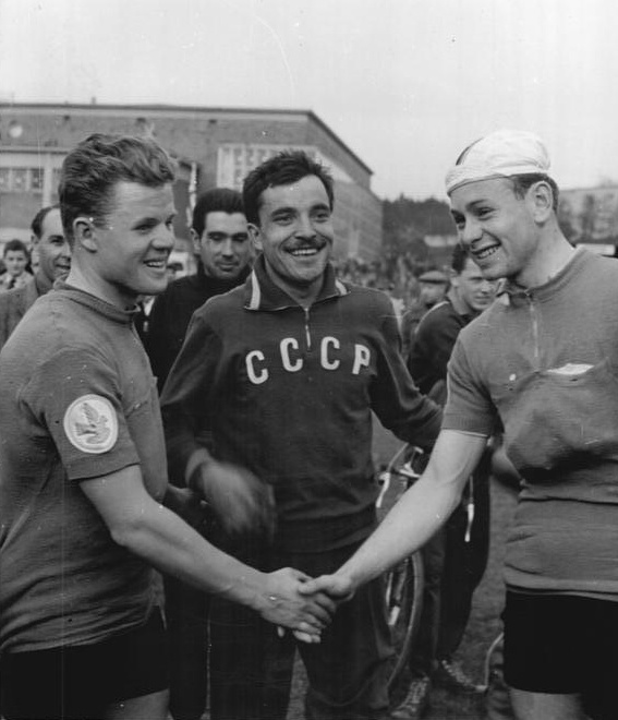 E. Hagen, Saidchushin, M. Weißleder Zentralbild Wendorf 6.5.1960 - Die 3. Etappe der Friedensfahrt ging am 4.5.1960 von Bratislava nach Gottwaldov über 195 km. UBz: Die ersten 3 der 3. Etappe bei einem freundschaftlichen Händedruck. (vlnr) Erich Hagen (DDR) wurde dritter, Saidchushin (UdSSR) wurde erster und Manfred Weißleder (DDR), der zweiter wurde.